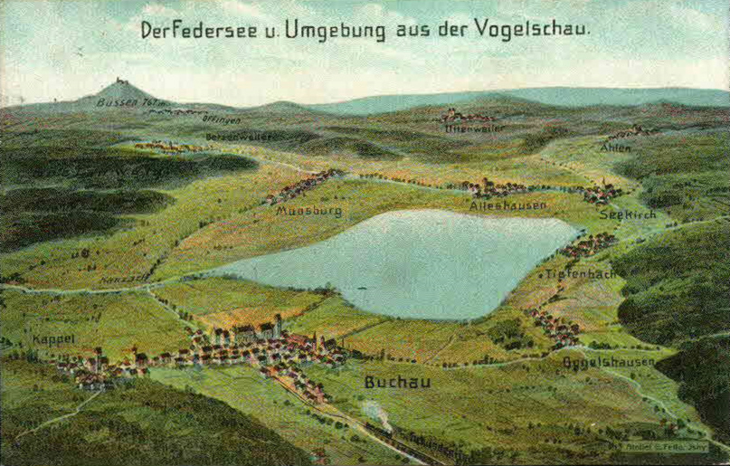 Ansichtskarte von Eugen Felle; Technoseum (Landesmuseum für Technik und Arbeit Mannheim) Motiv: Der Federsee u. Umgebung aus der Vogelschau